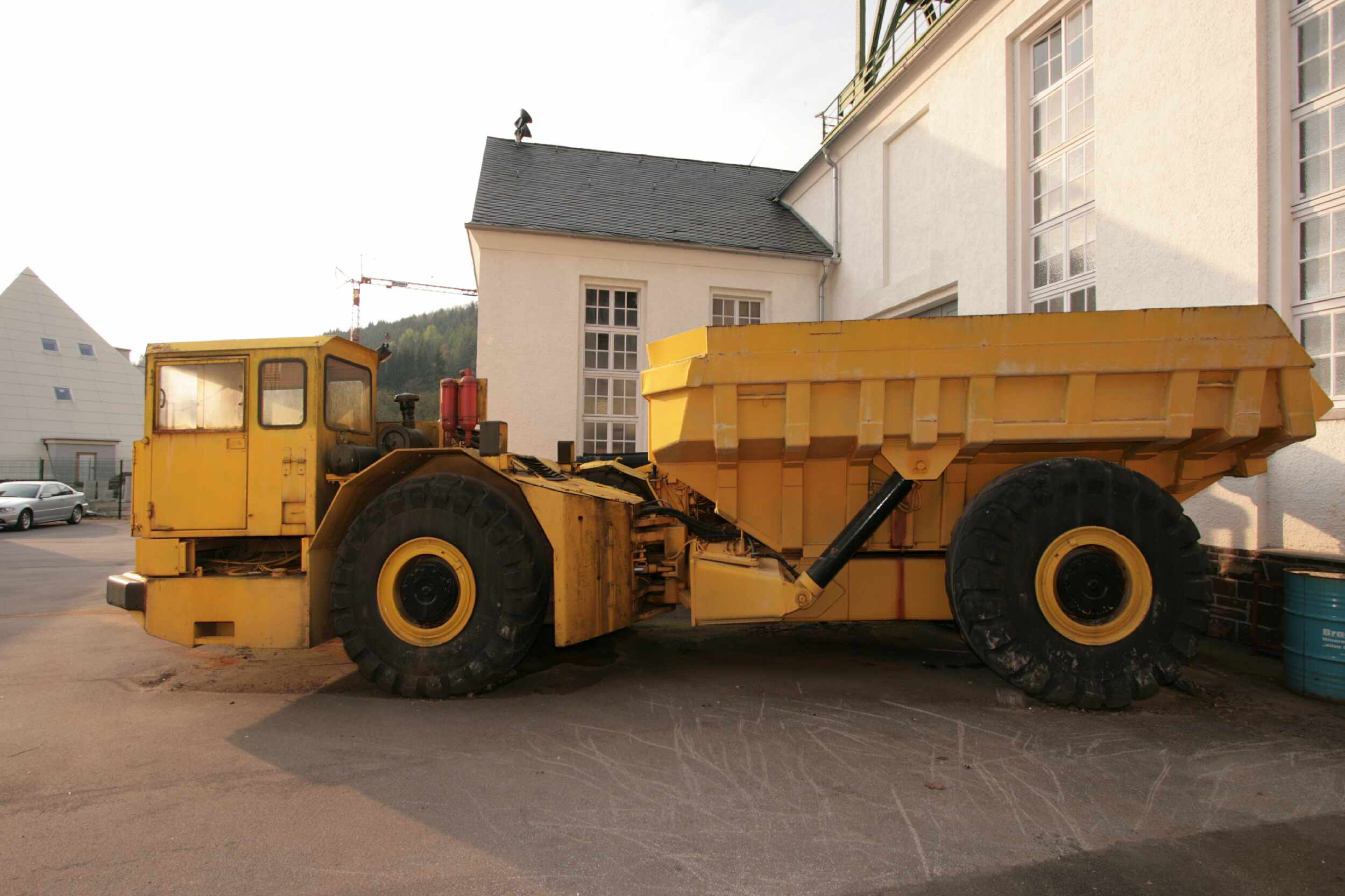 Bergbaumuseum Siciliaschacht Meggen, Muldenkipper